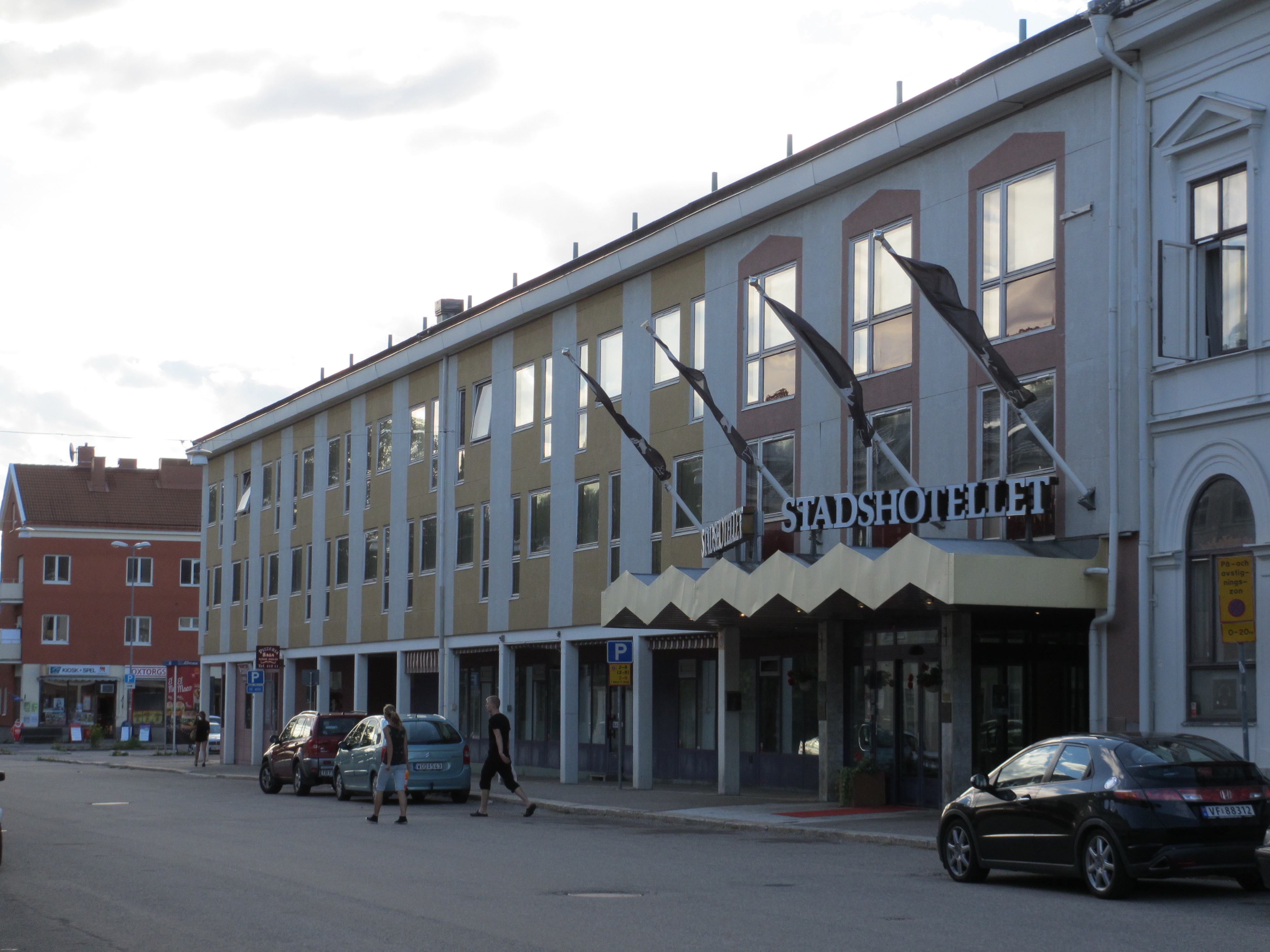 Stadshotellet i Söderhamn, nya delen